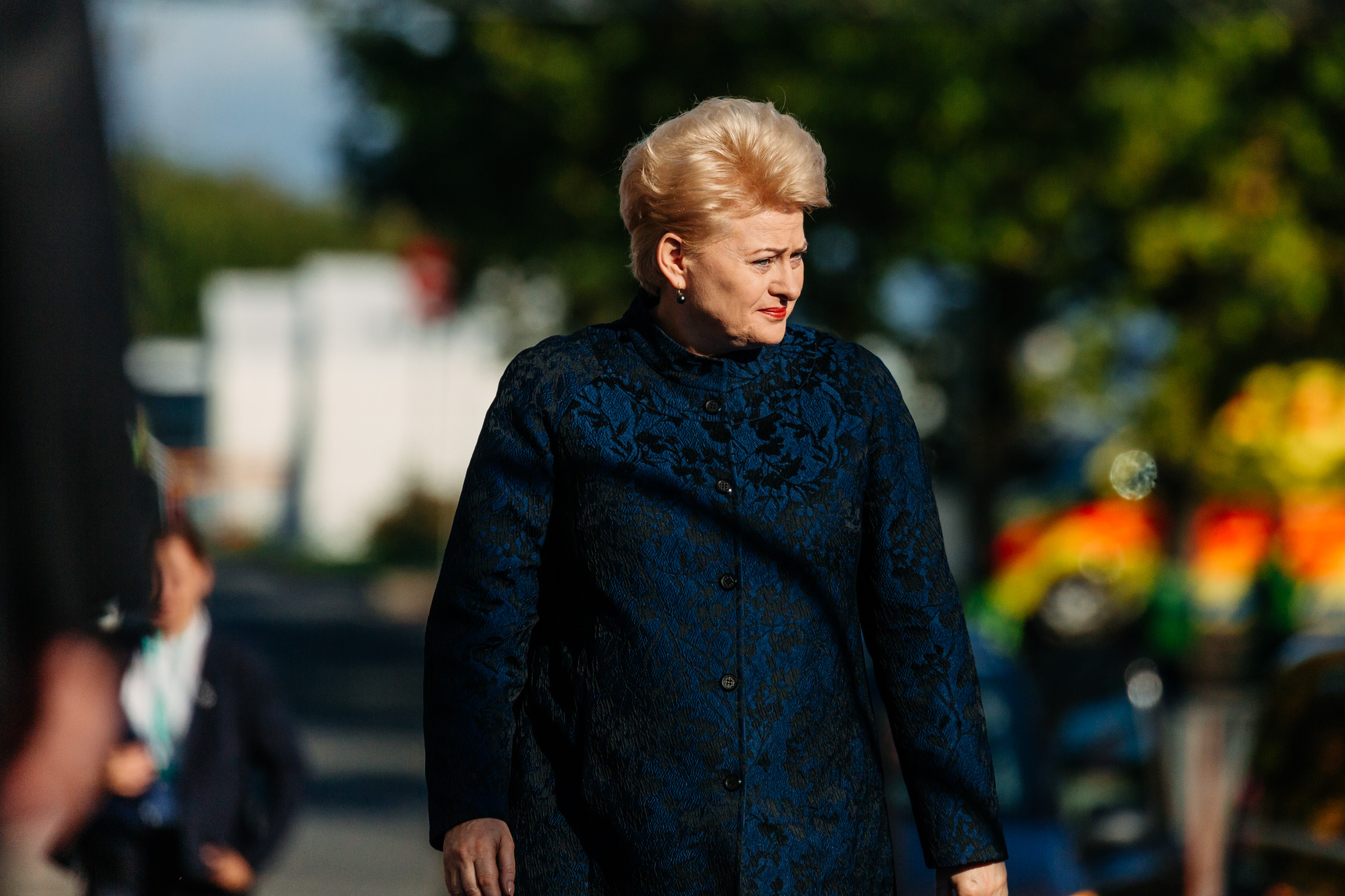 Dalia Grybauskaitė, President, Lithuania Photo: Arno Mikkor (EU2017EE)